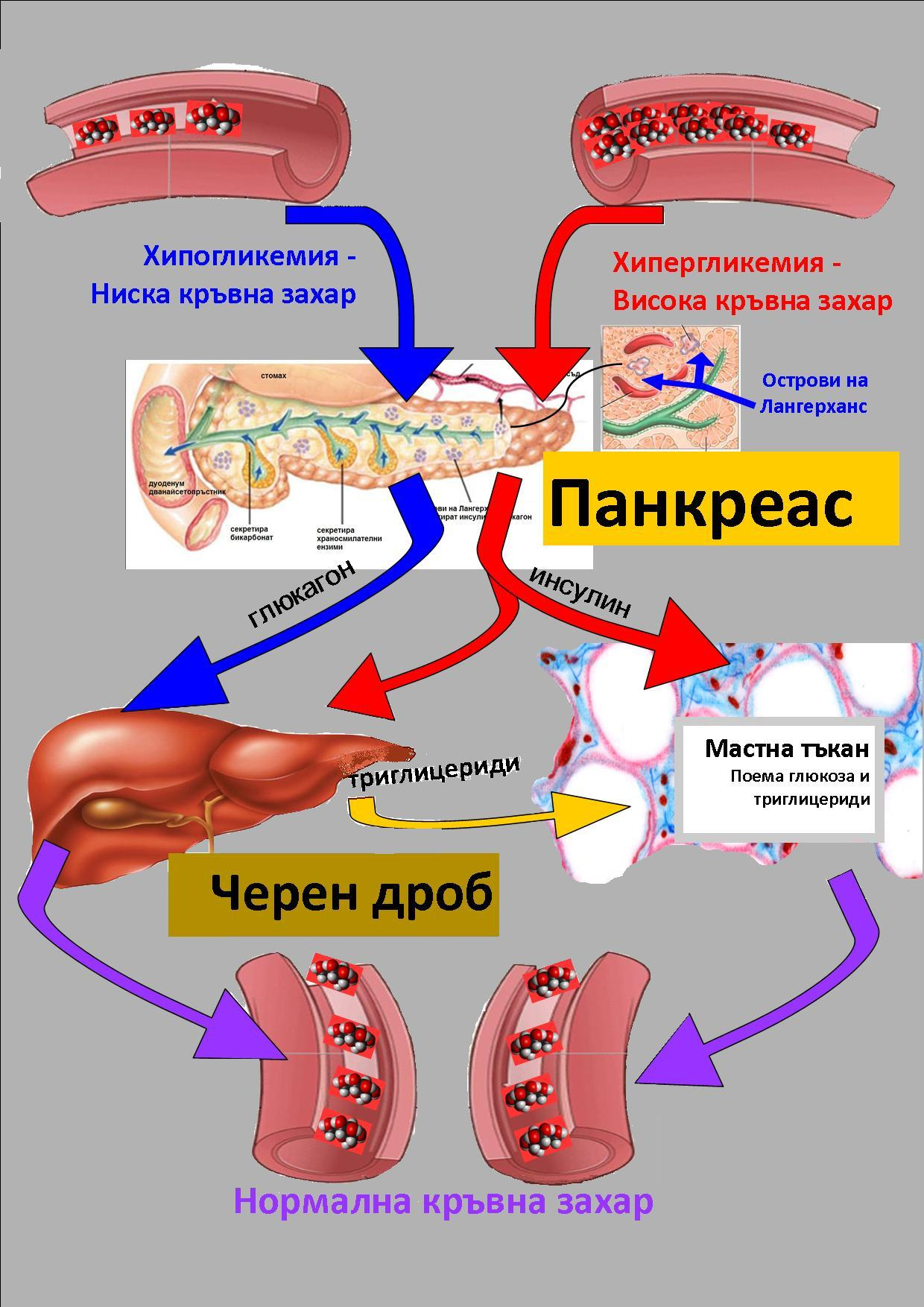 Диаграма на хормоналната егулация на кръвната захар